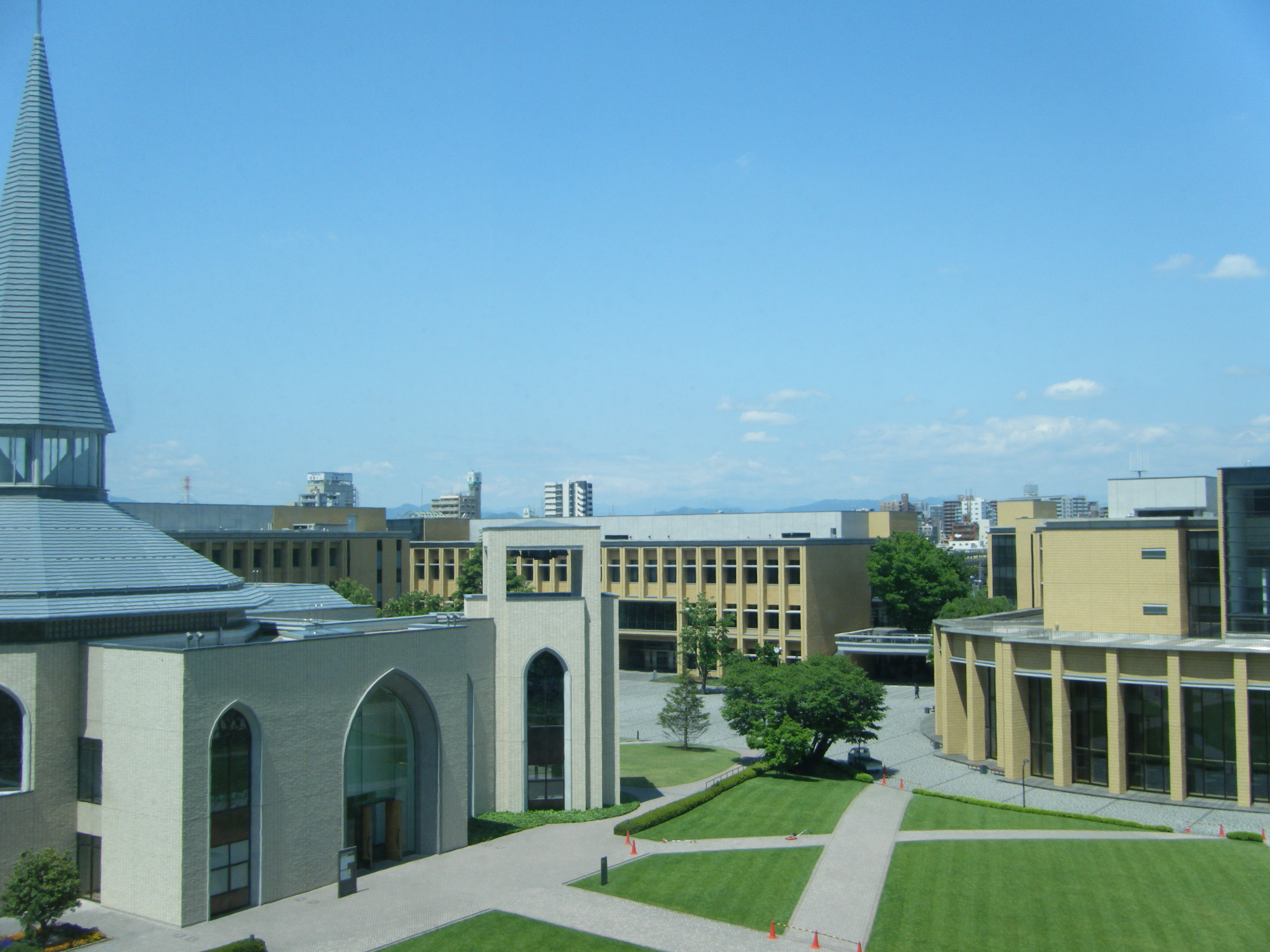 Aoyama Gakuin University Sagamihara Campus